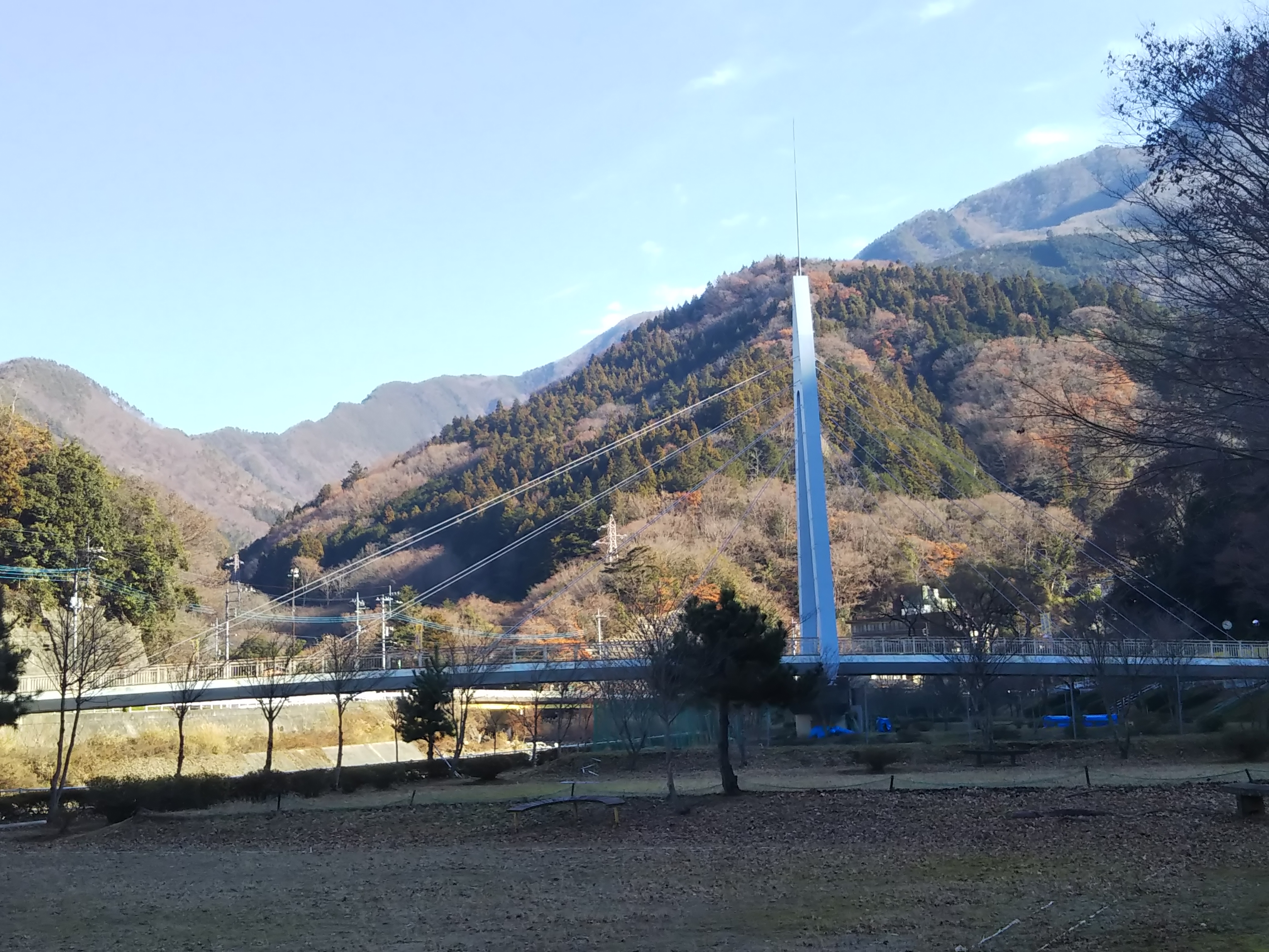 山梨県身延町、下部川に架かるふれあい橋（愛称 メロディーブリッジ）